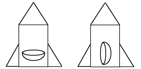 ロケット打ち上げ時のGで歪む凹面鏡